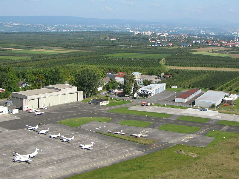 Flugplatz Mainz-Finthen Luftbild Hangar Vorfeld Tower Tankstelle